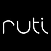 RUTI logo